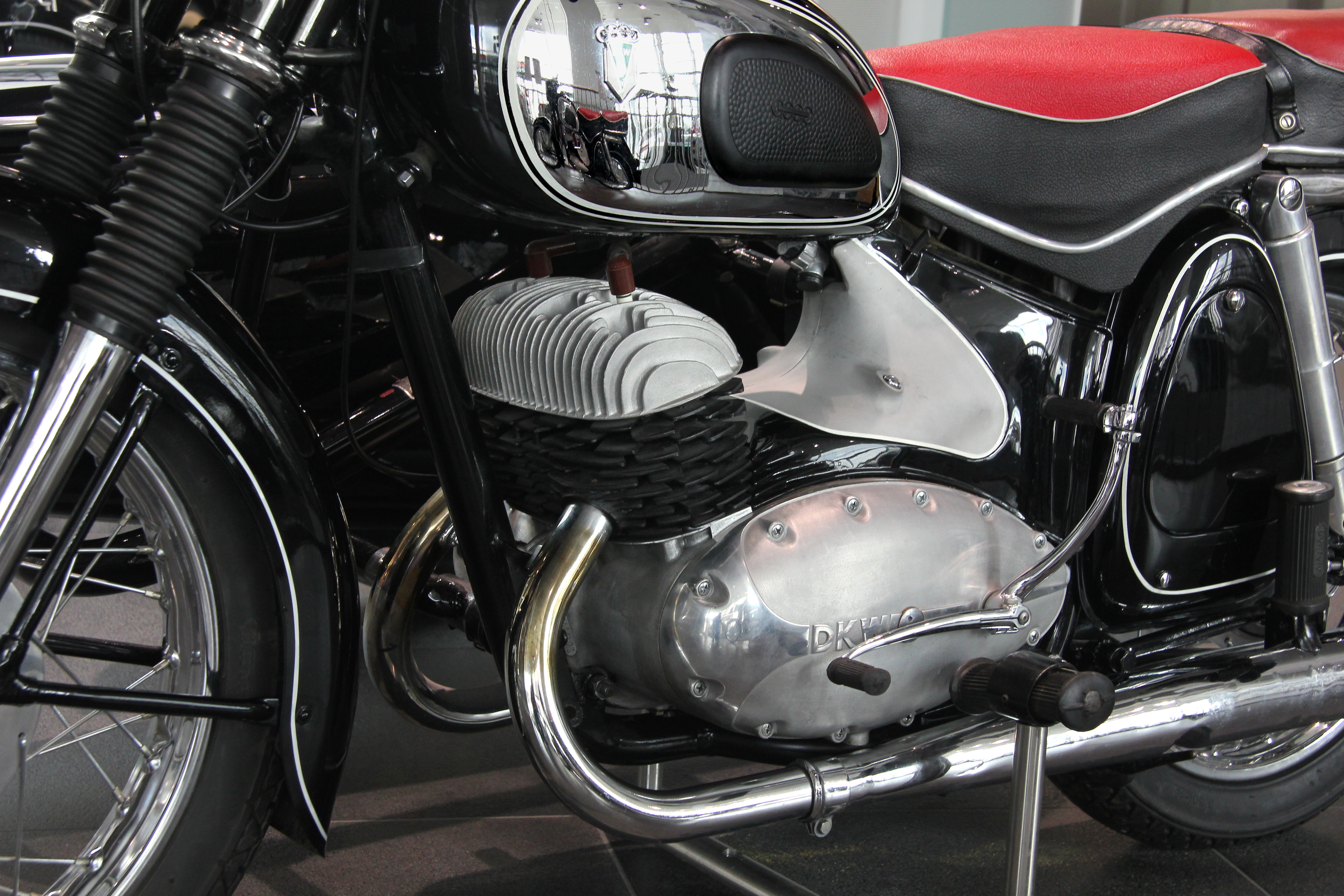 DKW RT 350 S mit Binder-Seitenwagen, Zweizylinder-Zweitaktmotor, 18,5 PS bei 5000/min, Baujahr 1956. 5290 Stück von 1955 bis 1956 gebaut